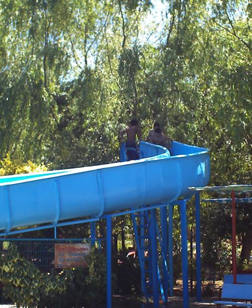 Jovenes a punto de lanzarse por el Tobogán del Complejo Turístico Paraíso en la Ciudad de Chillán en Chile